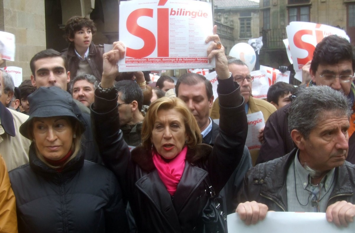 Rosa Díez, nunha manifestación de Galicia Bilingüe.